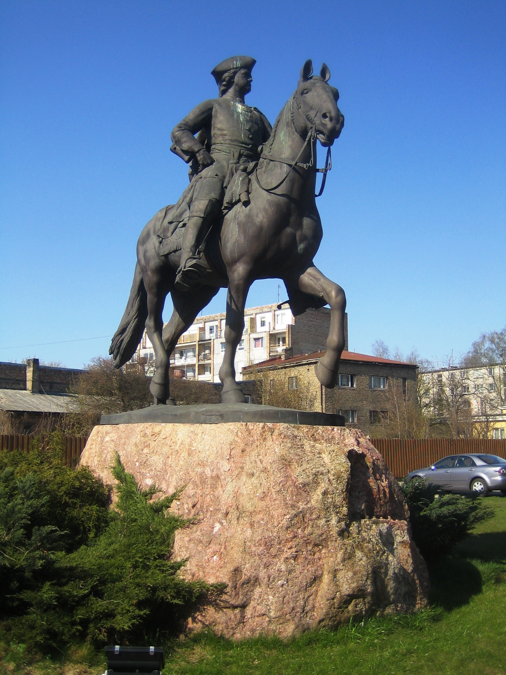 Фото восстановленного памятника Петру Первому в Риге